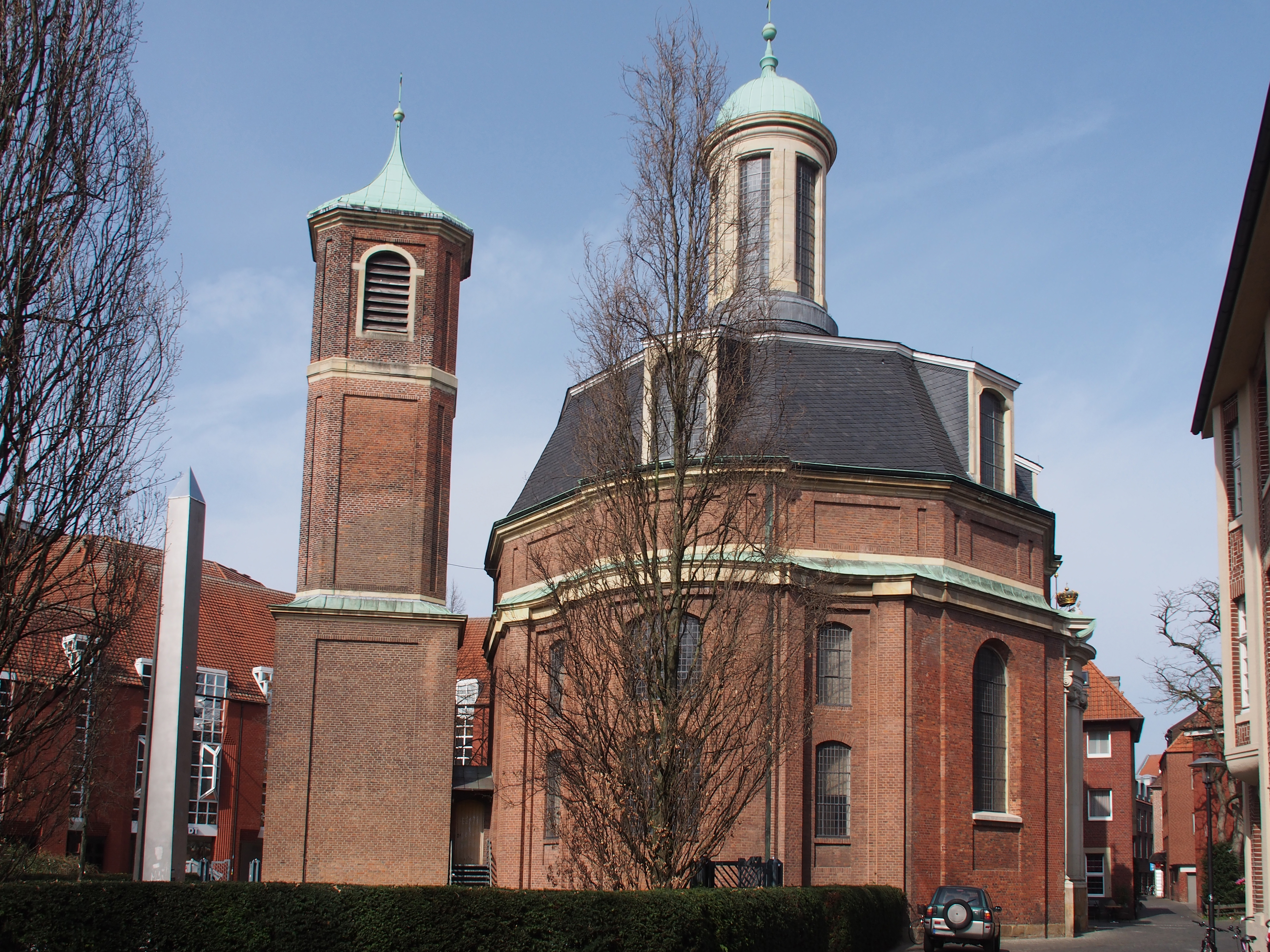 Clemenskirche (Münster) mit Glockenturm in Form eines Campanile, vorne die kleine Parkanlage.